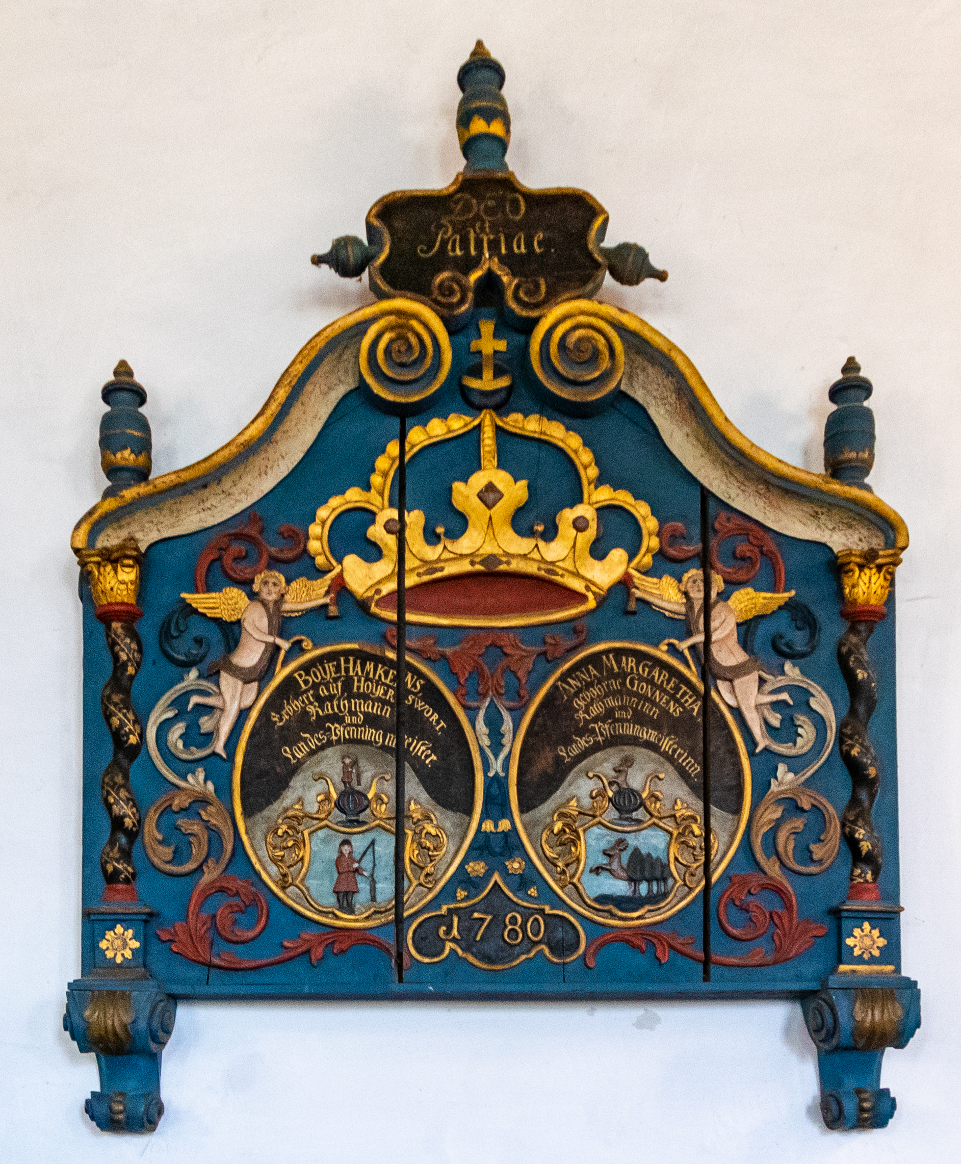 Herrenhaus Hoyerswort - Wandschmuck in der Diele